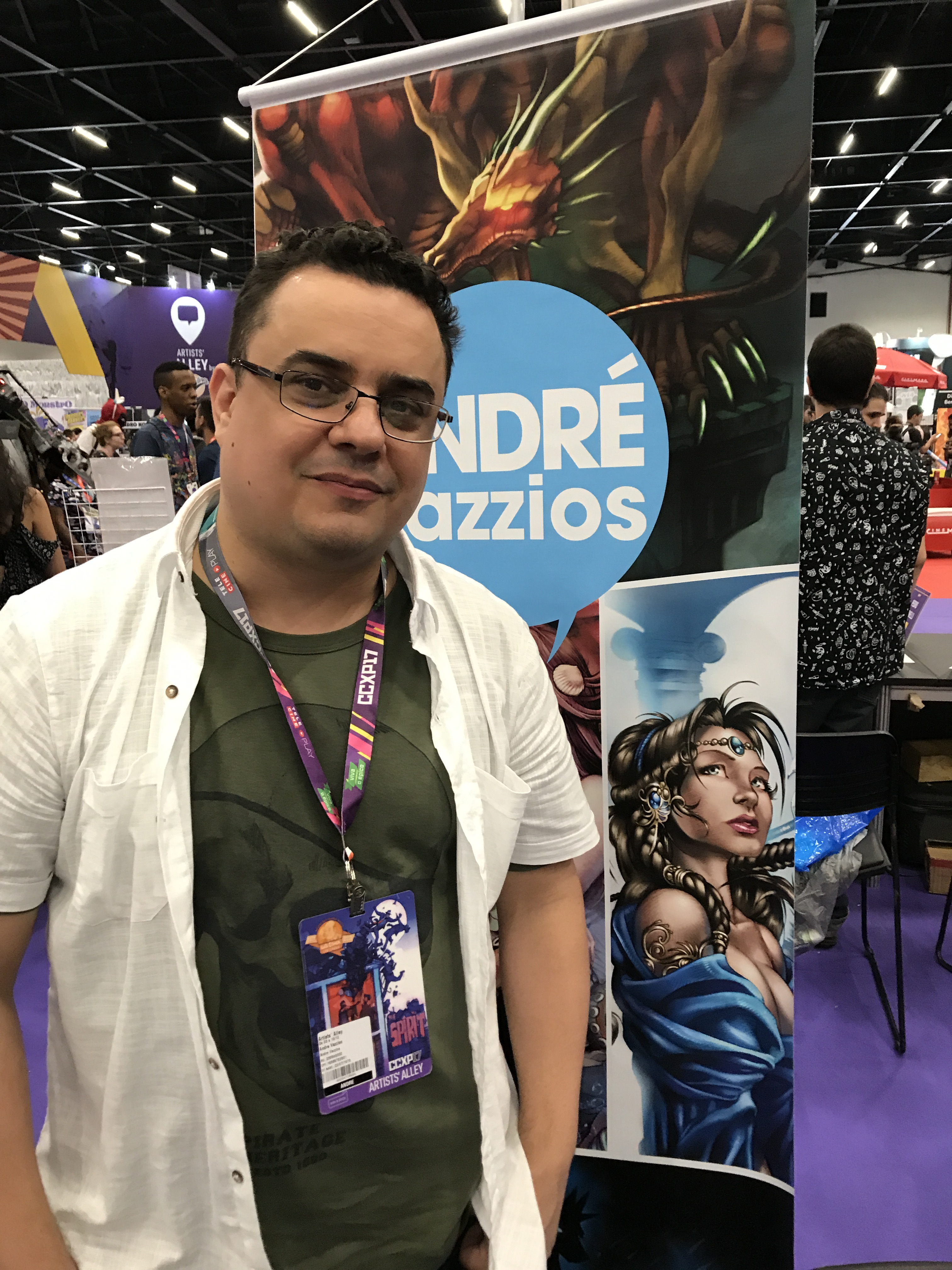 Artista André Vazzios na edição de 2017 da Comic Con Experience